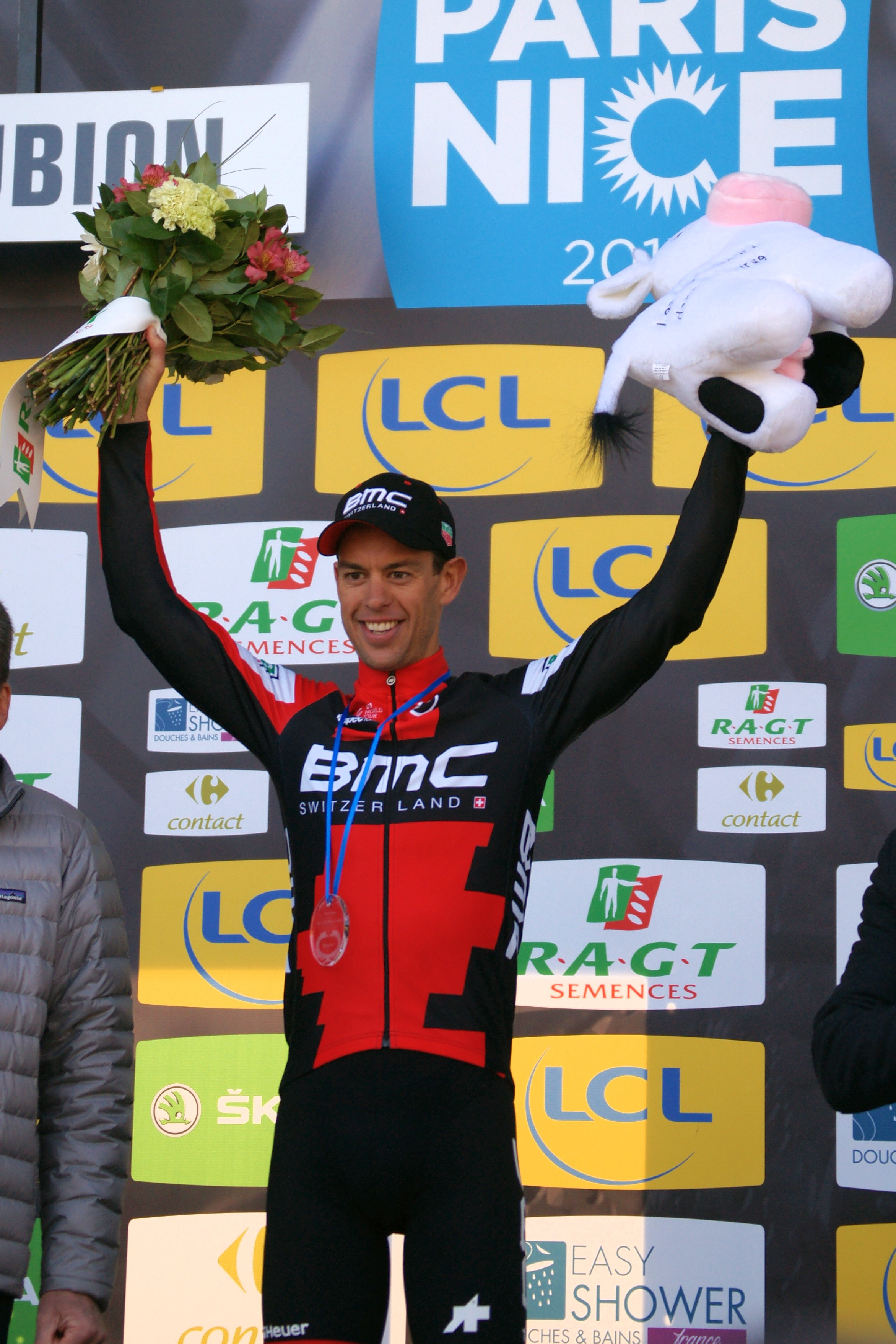 Richie Porte Roubion podium Paris-Nice 2017